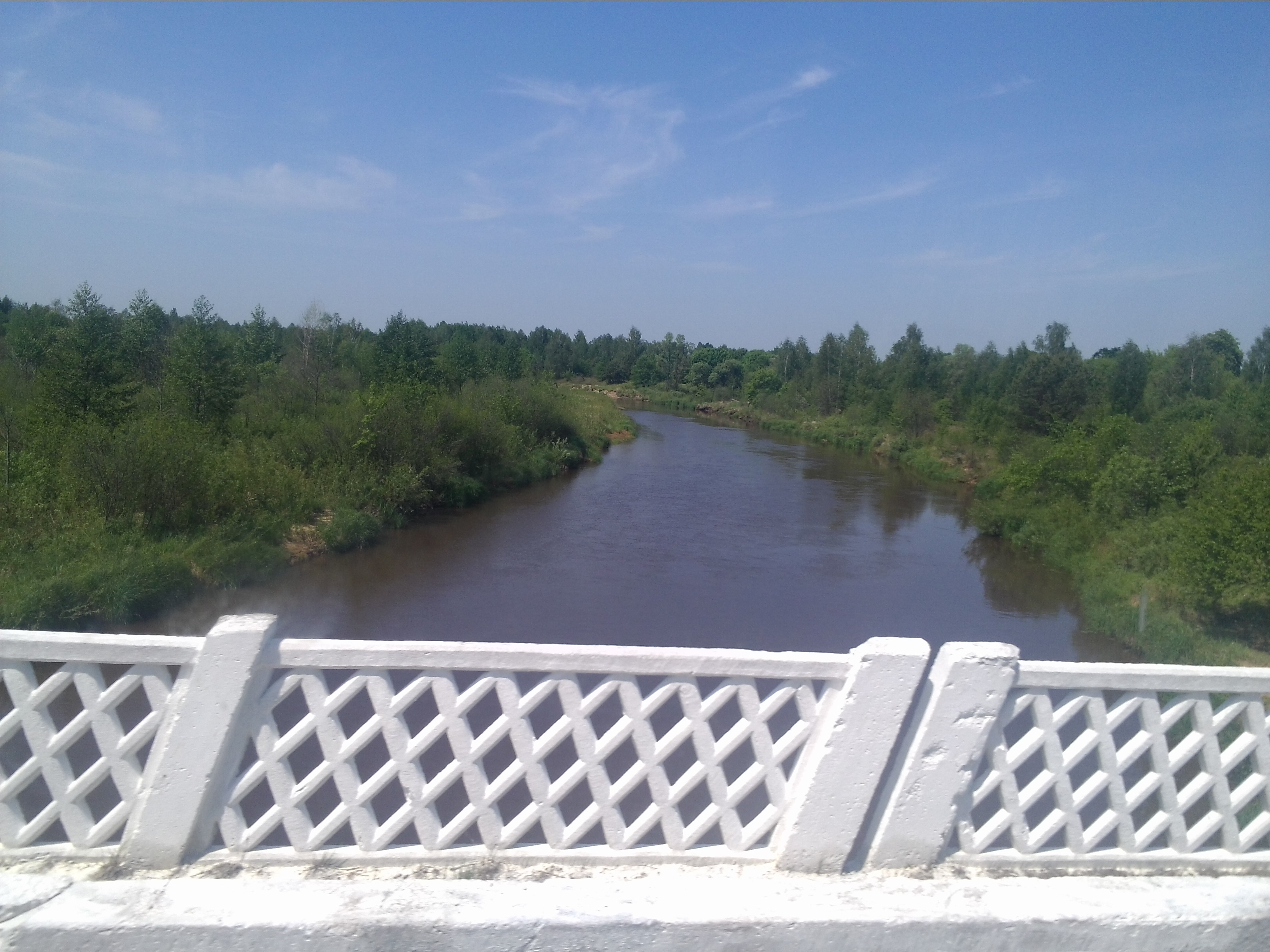 Річка Словечна в Наровлянському районі